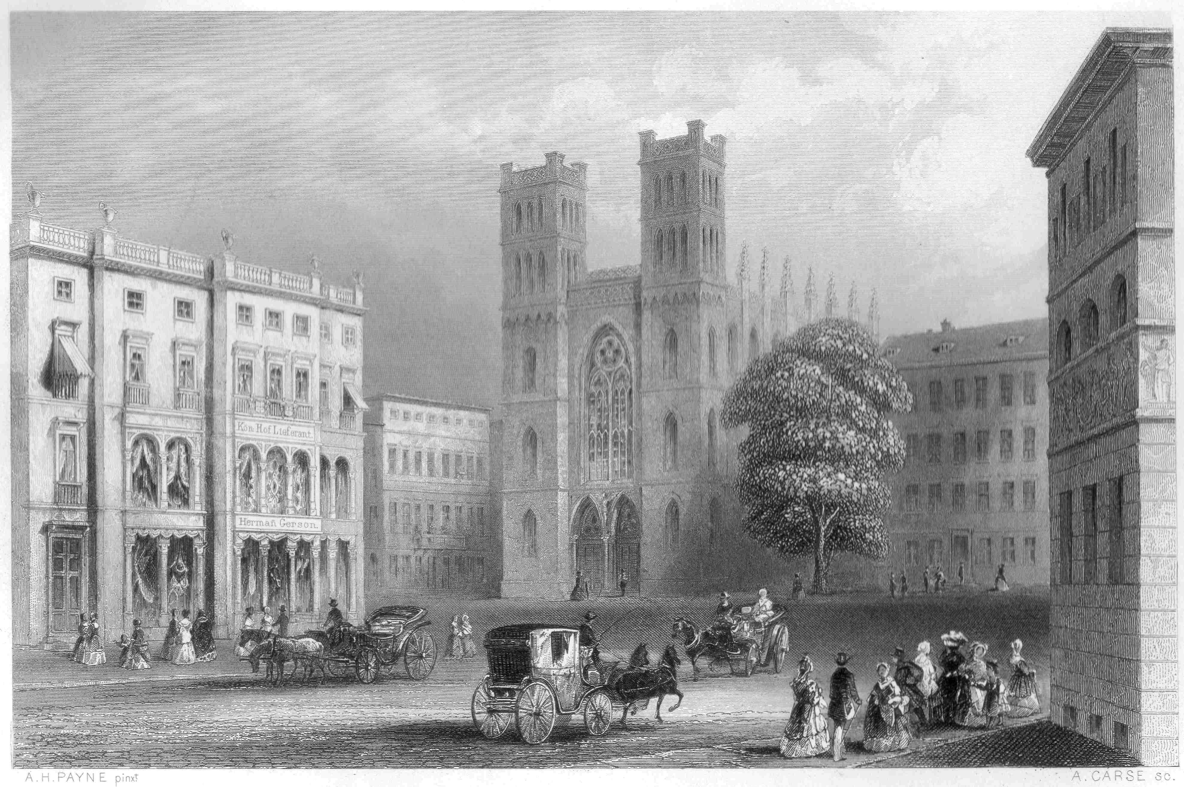 Berlin, Friedrichswerdersche Kirche (1850)